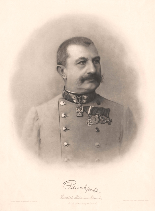 Heinrich von Pitreich (1841-1920), Austrian general and politician